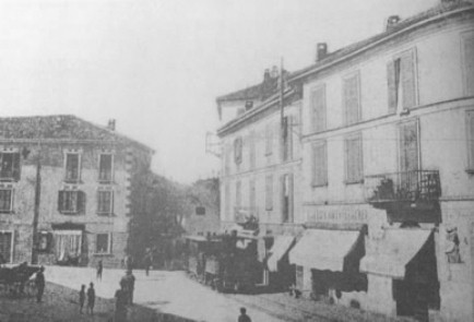 Casatenovo, tram